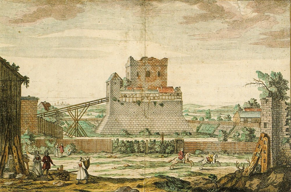 Ruine der Veste Erlangen von Norden. Die Ruine wurde 1783/84 abgetragen.